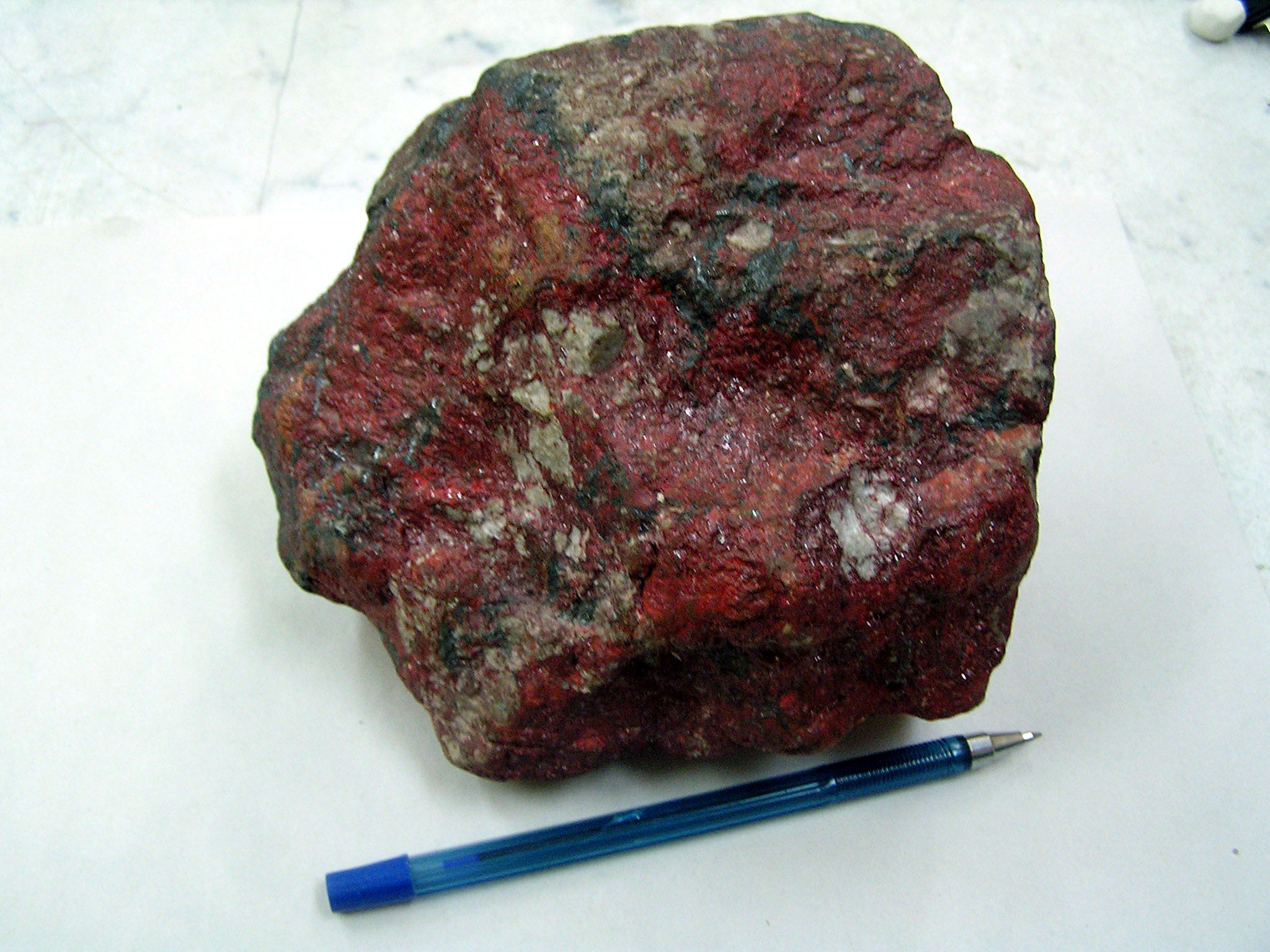 Штуф киновари из коллекции ГГФ НГУ